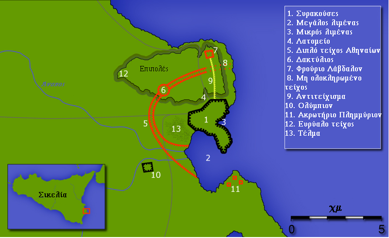 Η πολιορκία των Συρακουσών